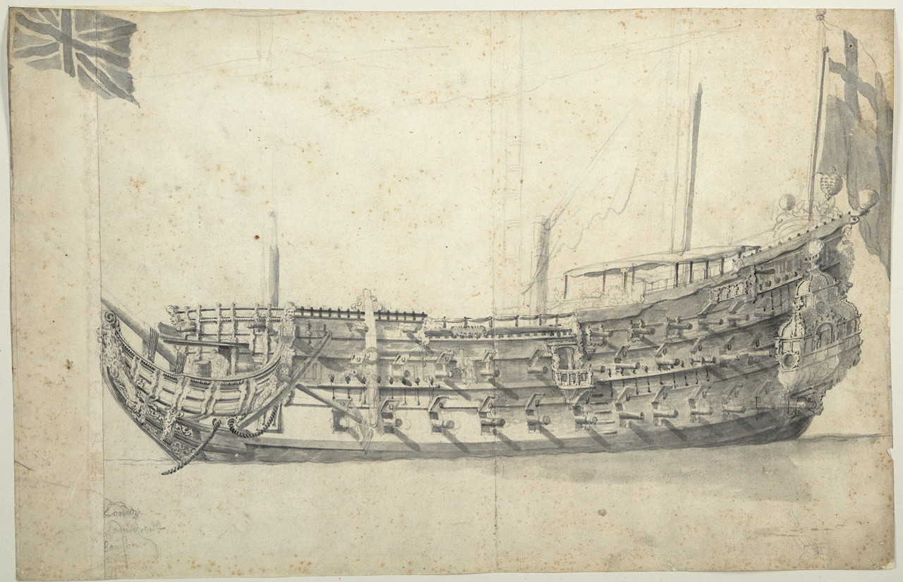 Zeichnung der London, möglicherweise 1660 bei der Überfahrt des neuen Königs Charles II erstellt